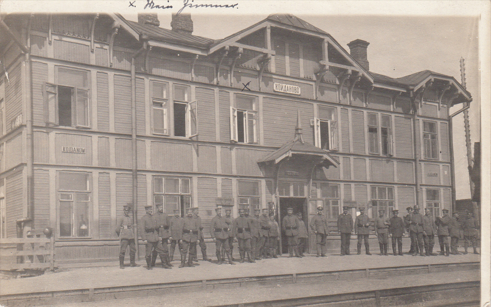 Беларуская (тарашкевіца): Койданаў (Kojdanaŭ), вуліца Вакзальная (vulica Vakzalnaja). Чыгуначная станцыя